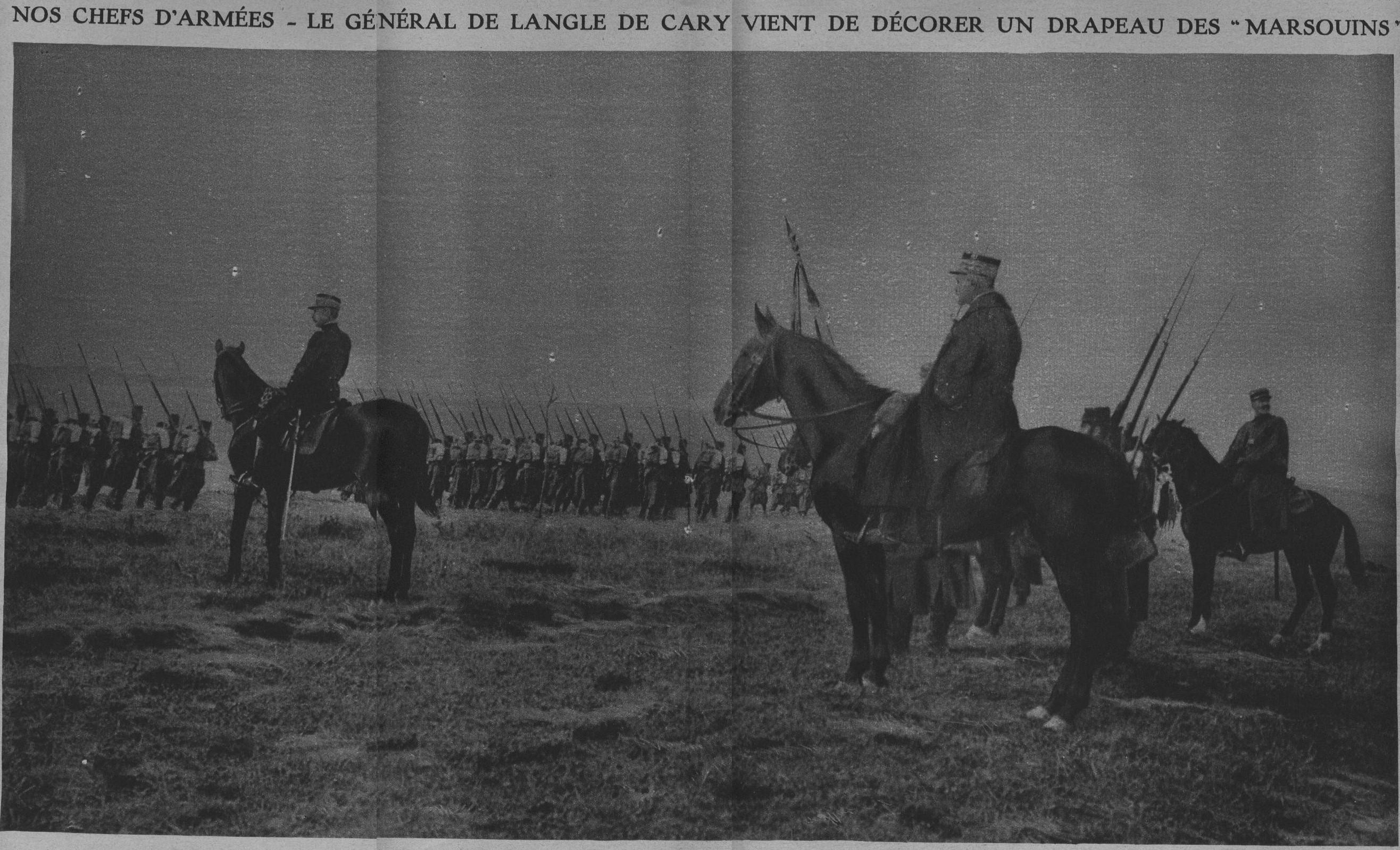 le général de Langle de Cary remettant une décoration au 3 régiment étranger d'infanterie. Ceux-ci défilent devant lui après cette cérémonie sur le plateau de Valmy.